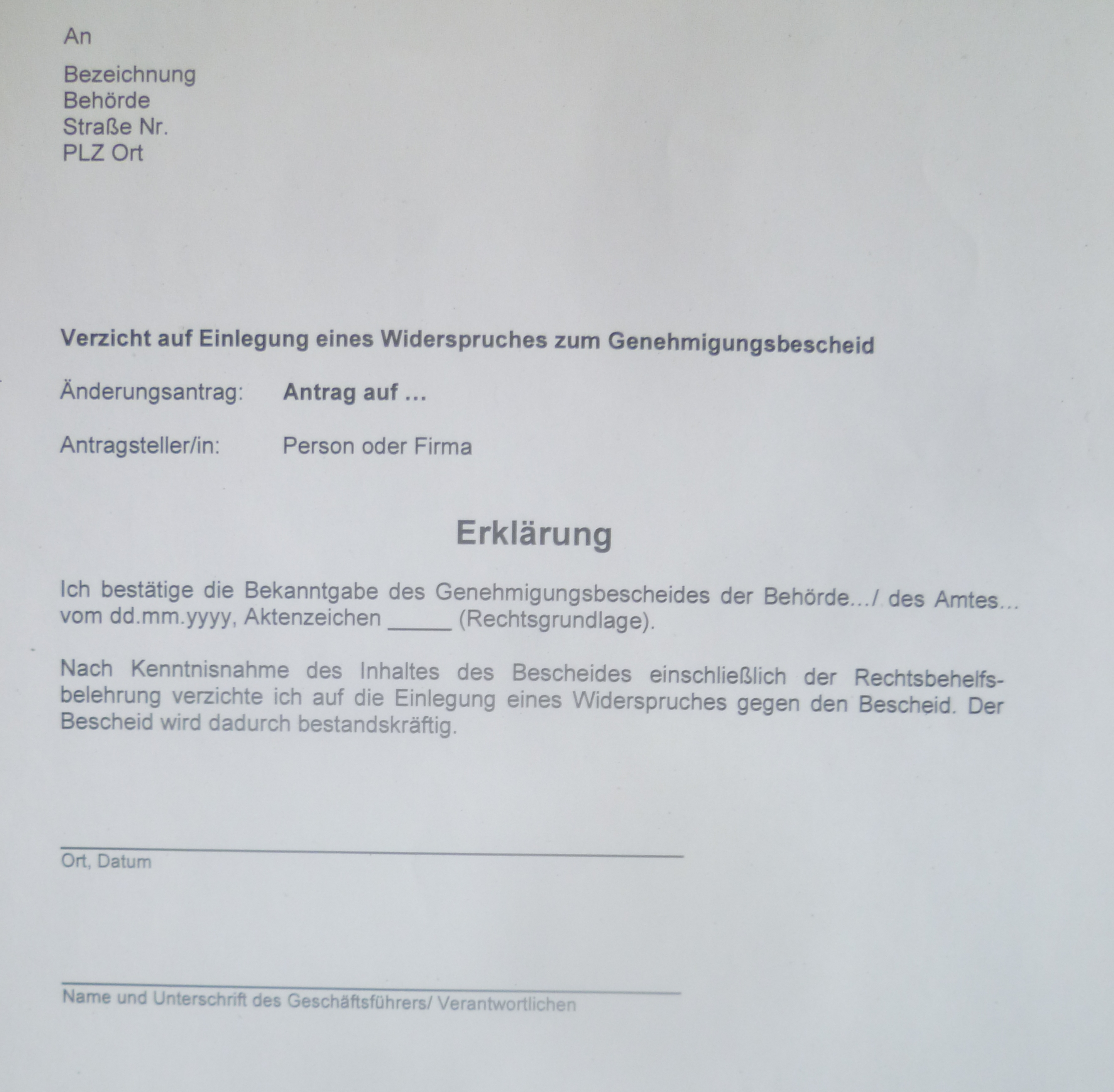 Rechtsmittelverzicht mit Anschrift an eine Behörde